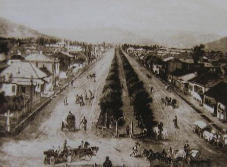 Изображение Владикавказа во второй половине XIX века